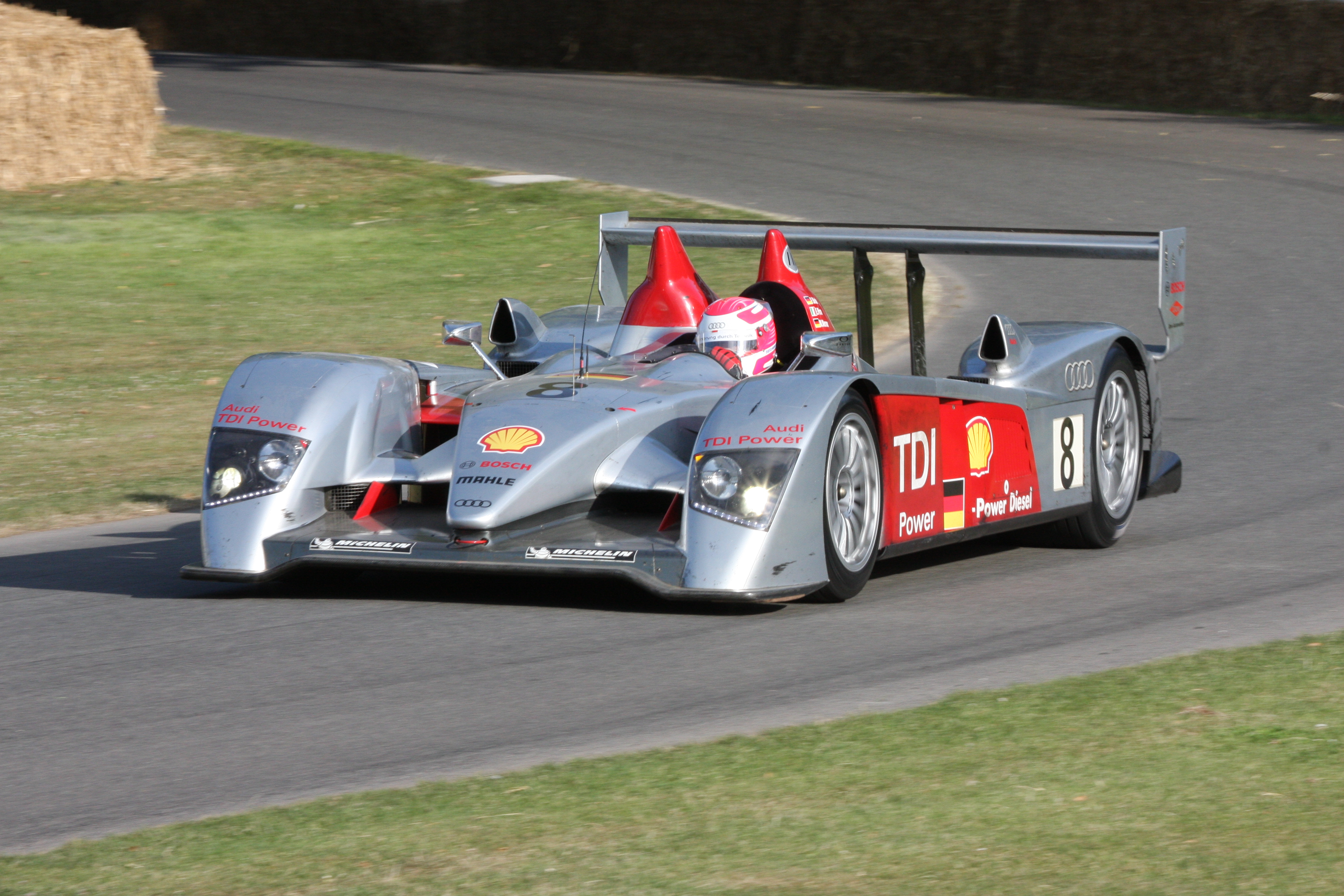 2006 Audi R10 TDI